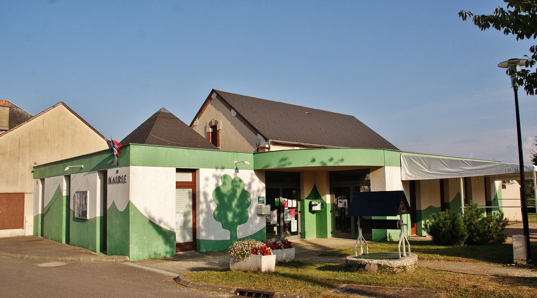 La Mairie